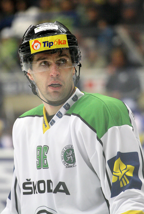 Jaroslav Balaštík v dresu BK Mladá Boleslav